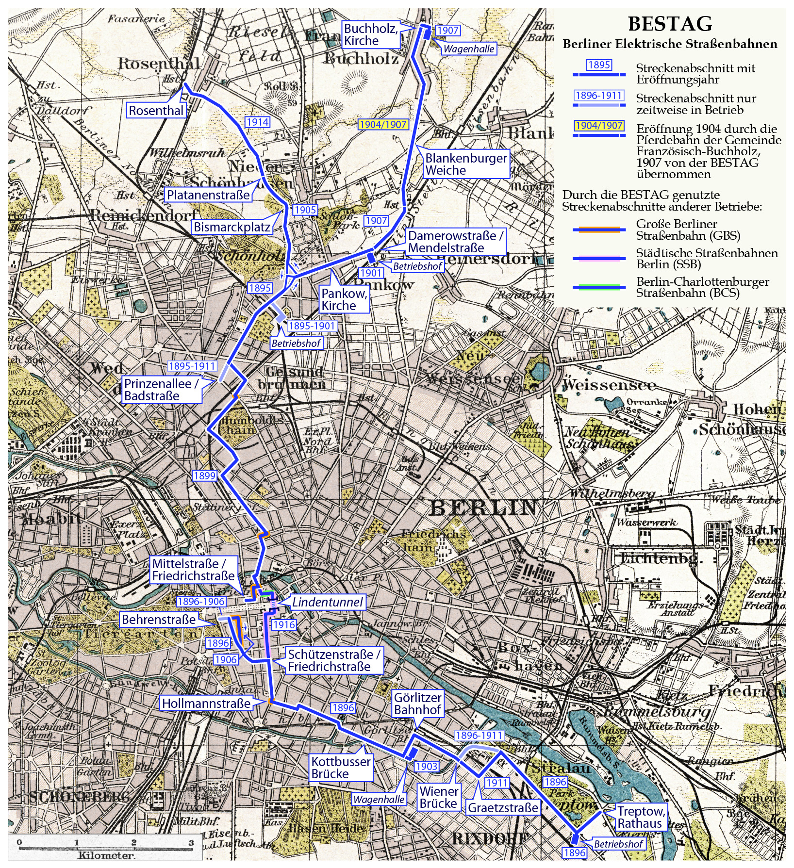 Karte der Berliner Elektrischen Straßenbahnen (BESTAG)